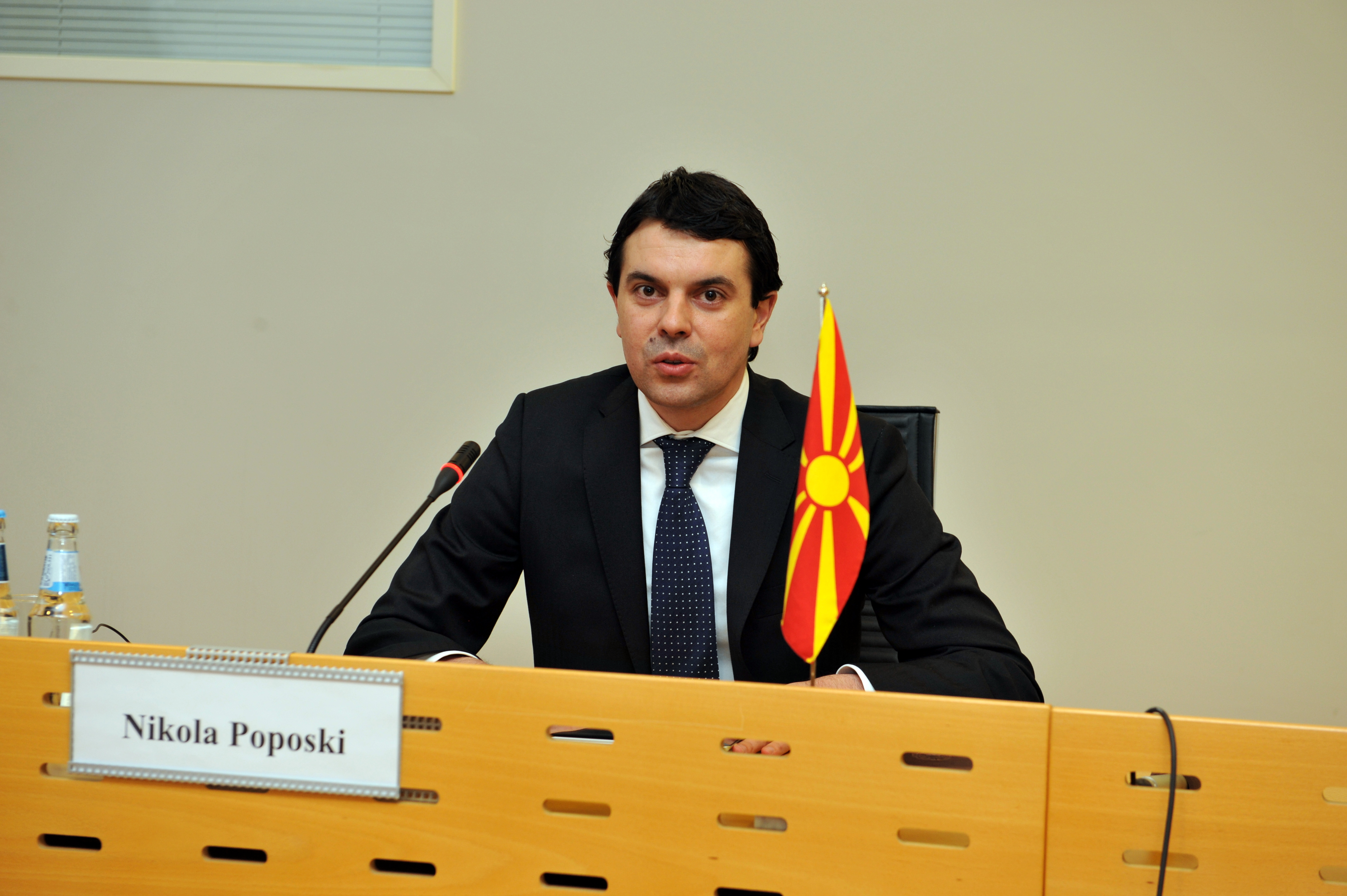 Makedoonia välisminister Nikola Poposki, Tallinn